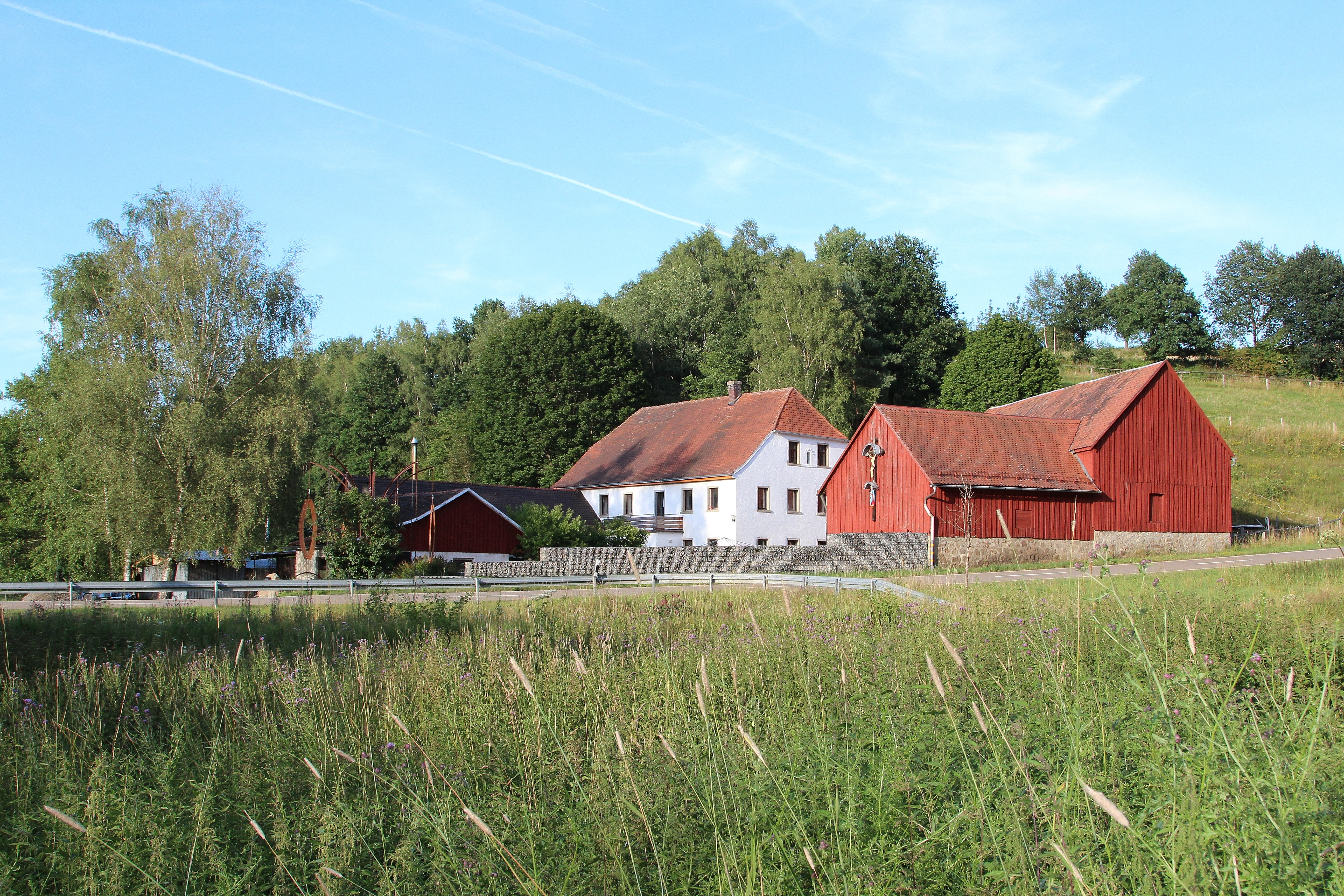 Kohlmühle, Gemeinde Gleiritsch, Landkreis Schwandorf, Oberpfalz, Bayern